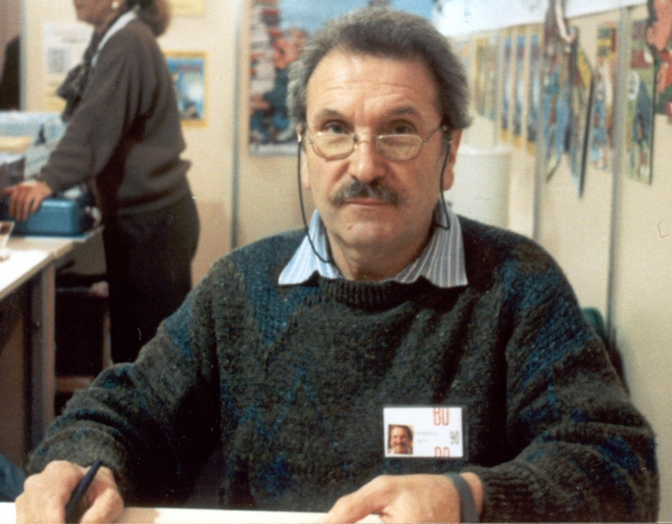 Jean Tabary, auteur de bande dessinée